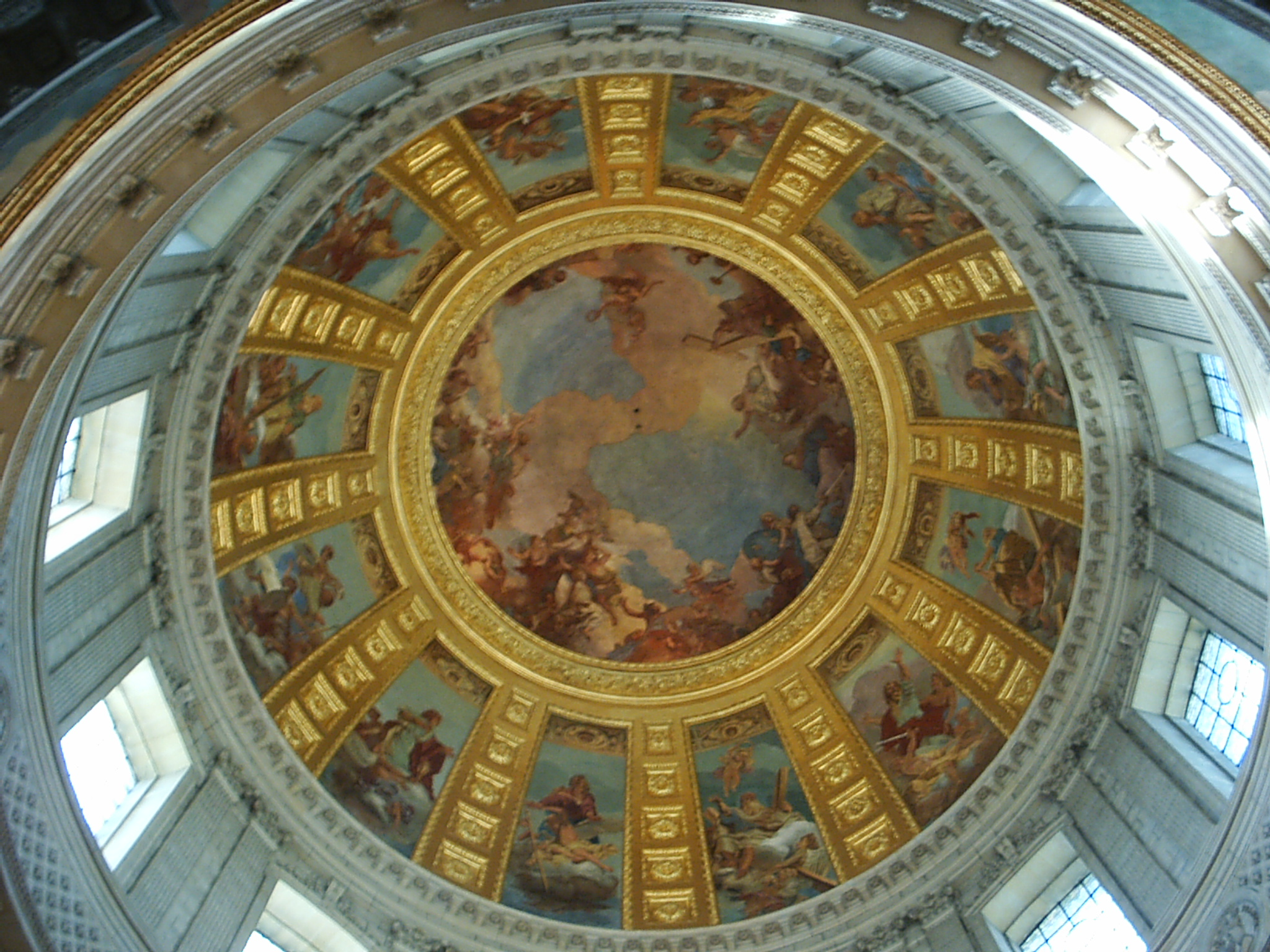 dôme de L'hotel des invalides à Paris en France vue verticale